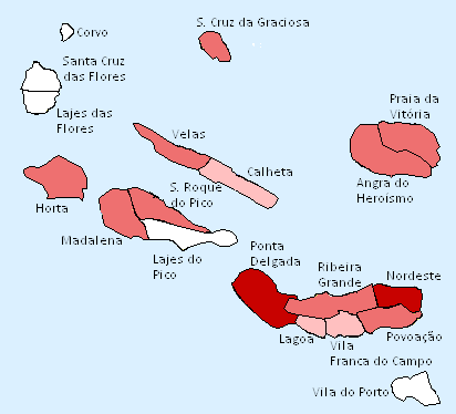 Mapa dos Açores com concelhos afetados por COVID-19 em diferentes tons de vermelho conforme o número de casos em cada concelho